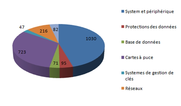 Cerficats émis par domaine